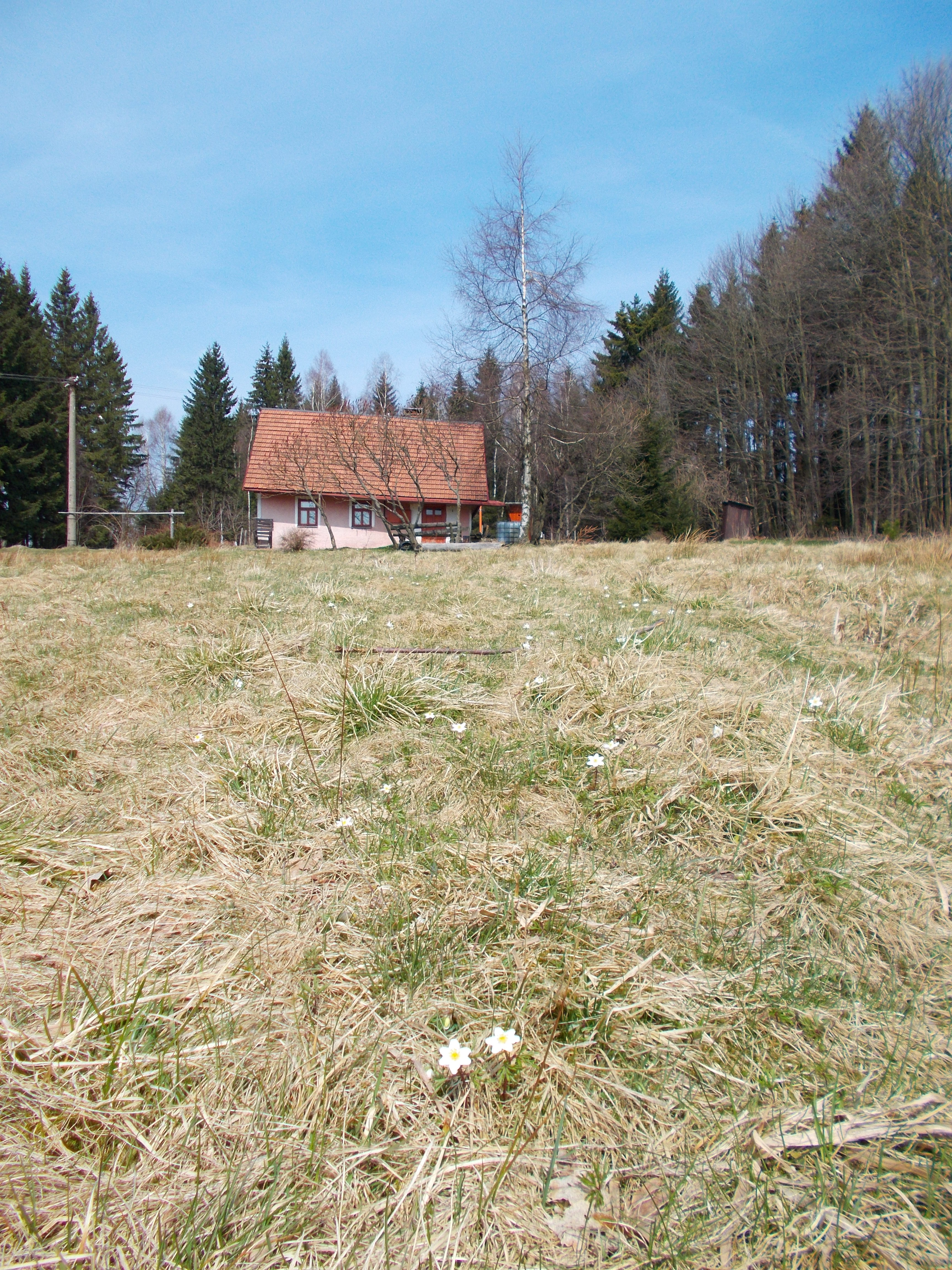 PP Rašelina